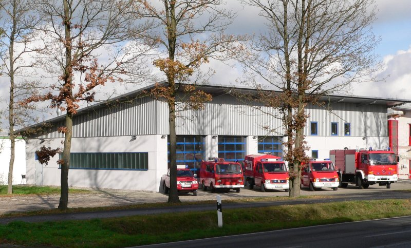 Das Feuerwehrgerätehaus in Vettelschoß